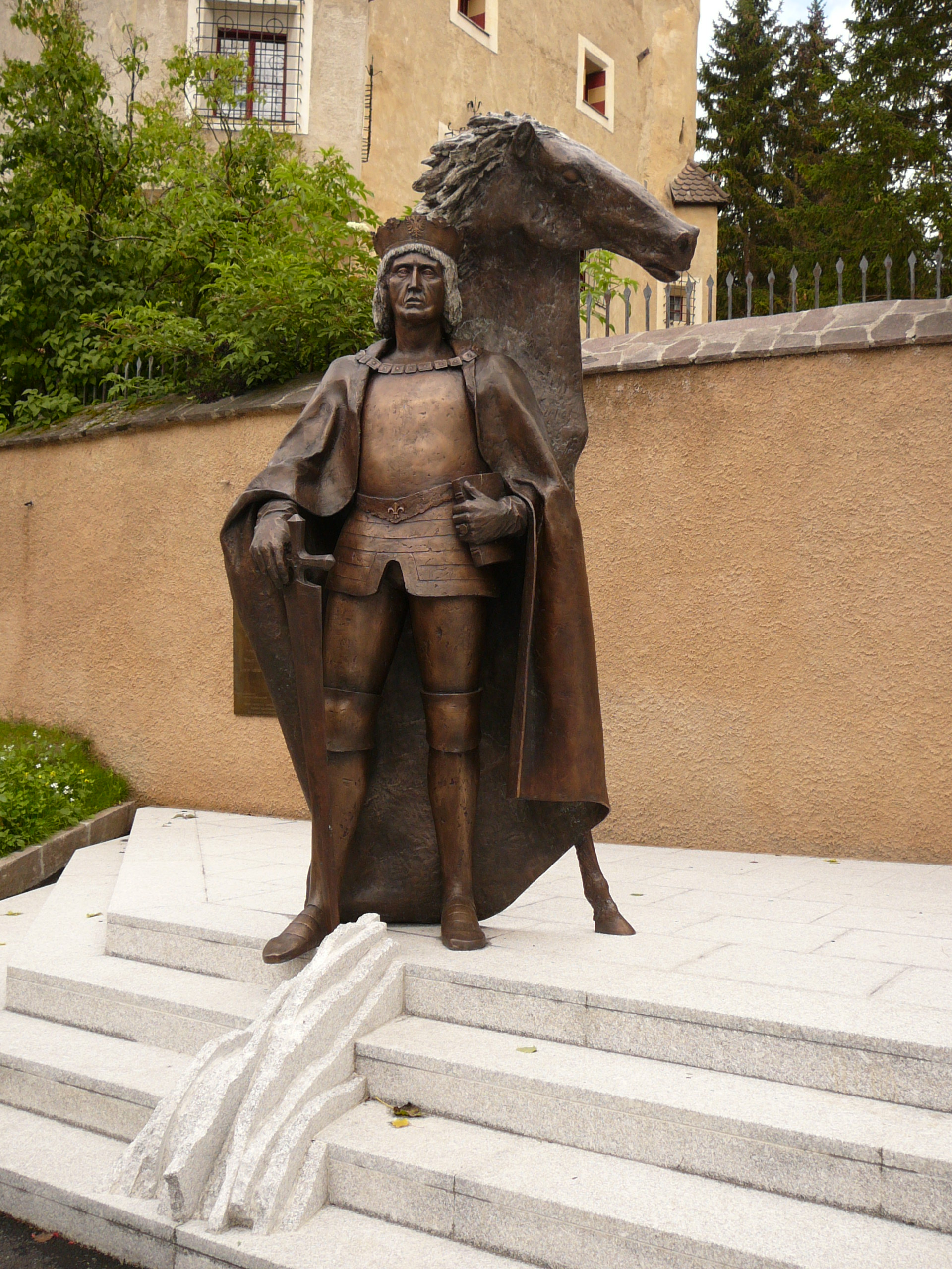 Maximilian a Dobbiaco